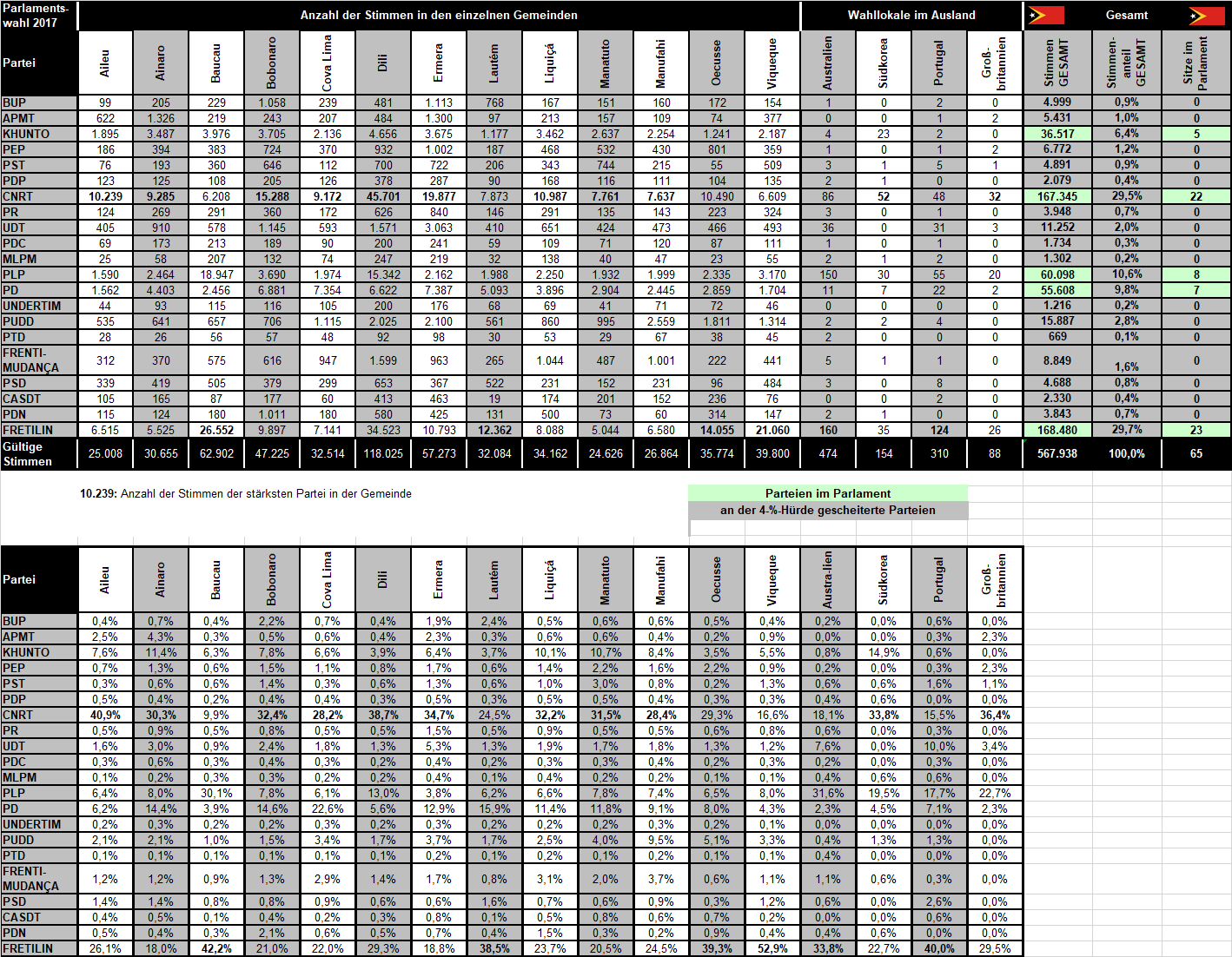 Ergebnis der Parlamentswahl 2017 in Osttimor nach Gemeinden aufgeteilt. Informationen nach CNE